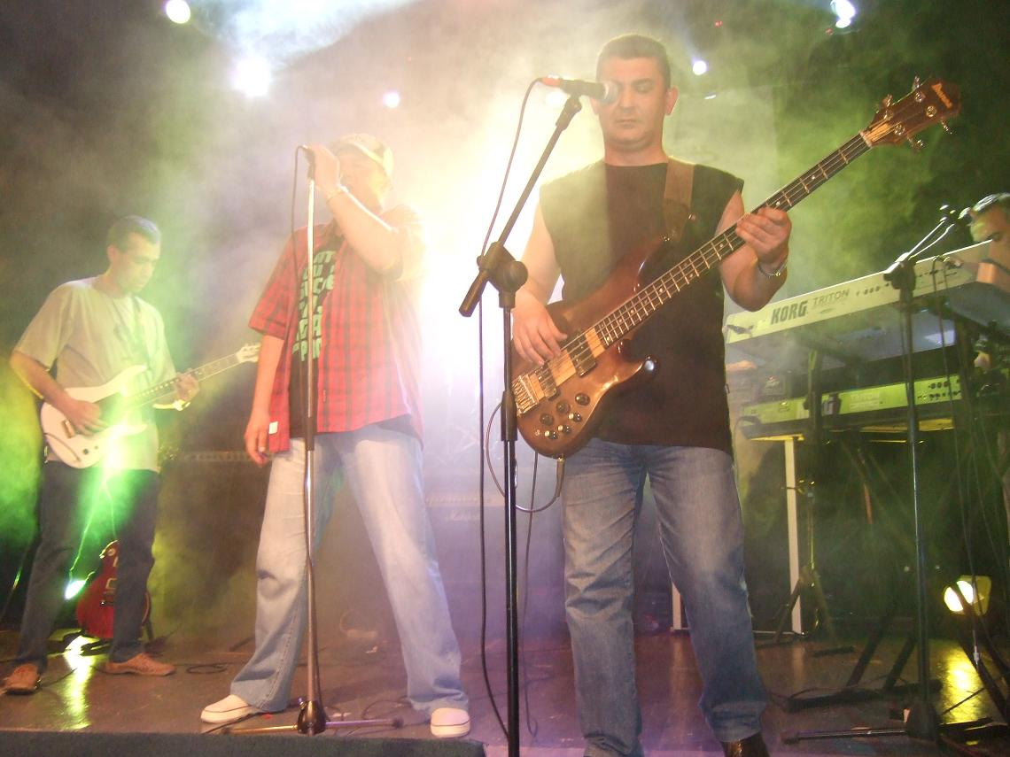 Էլիպս ռոք խումբը, որը հիմնվել է 1986 թվականին, տարիներից հետո 2009 թվականի համերգին՝ Երևանի Տիկնիկային թատրոնում: Elips Armenian rock band, formed in 1986, at a concert at Yerevan State Puppet Theater in 2009 after a long hiatus.